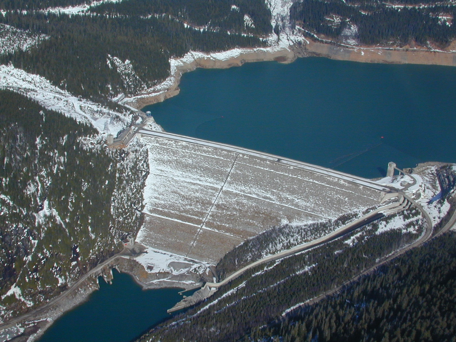 Mica Dam